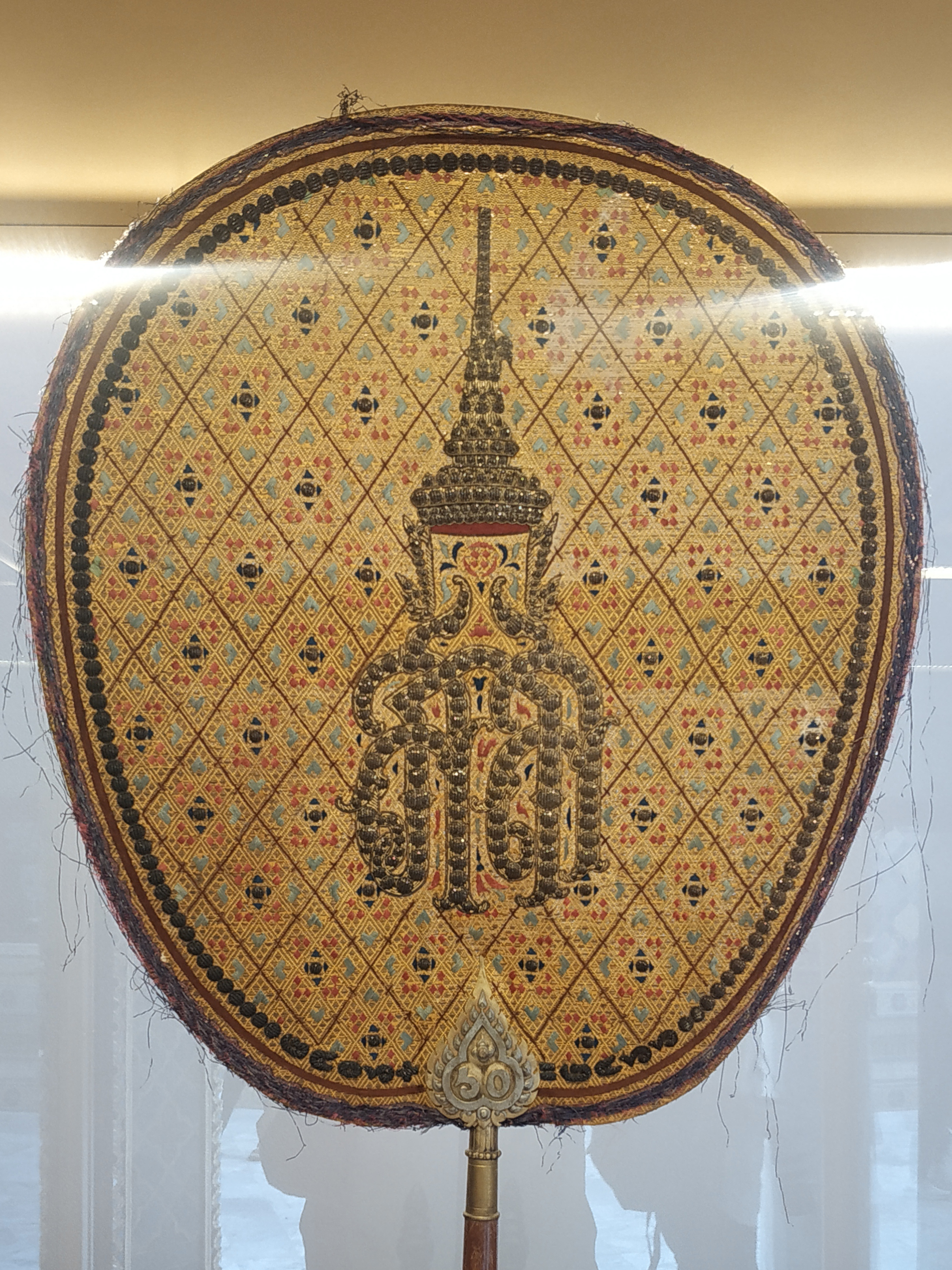 พัดรองที่ระลึกในการบำเพ็ญพระกุศลฉลองพระชันษา 5 รอบ พระวิมาดาเธอ กรมพระสุทธาสินีนาฏ ปิยมหาราชปดิวรัดา พ.ศ. 2466 ผลงานการออกแบบของสมเด็จพระเจ้าบรมวงศ์เธอ เจ้าฟ้ากรมพระยานริศรานุวัติวงศ์ สมบัติของวัดราชบพิธสถิตมหาสีมาราม กรุงเทพมหานคร จัดแสดงในงานสมโภชวัดราชบพิธสถิตมหาสีมาราม เนื่องในวาระครบ 150 ปี แห่งการสถาปนาพระอาราม บันทึกภาพเมื่อวันที่ 1 กุมภาพันธ์ พ.ศ. 2563